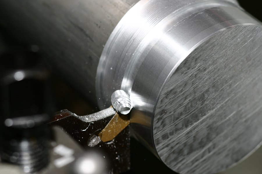 Stechbearbeitung beim Drehen von Aluminium